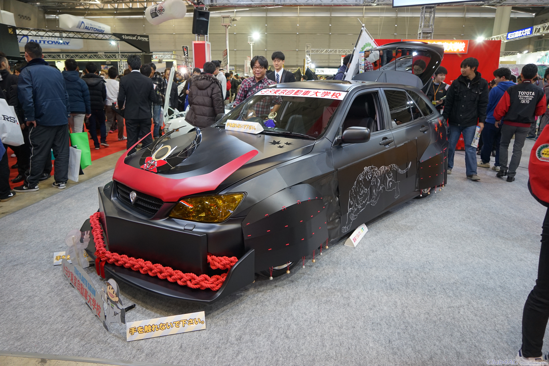 Tokyo Auto Salon 2019